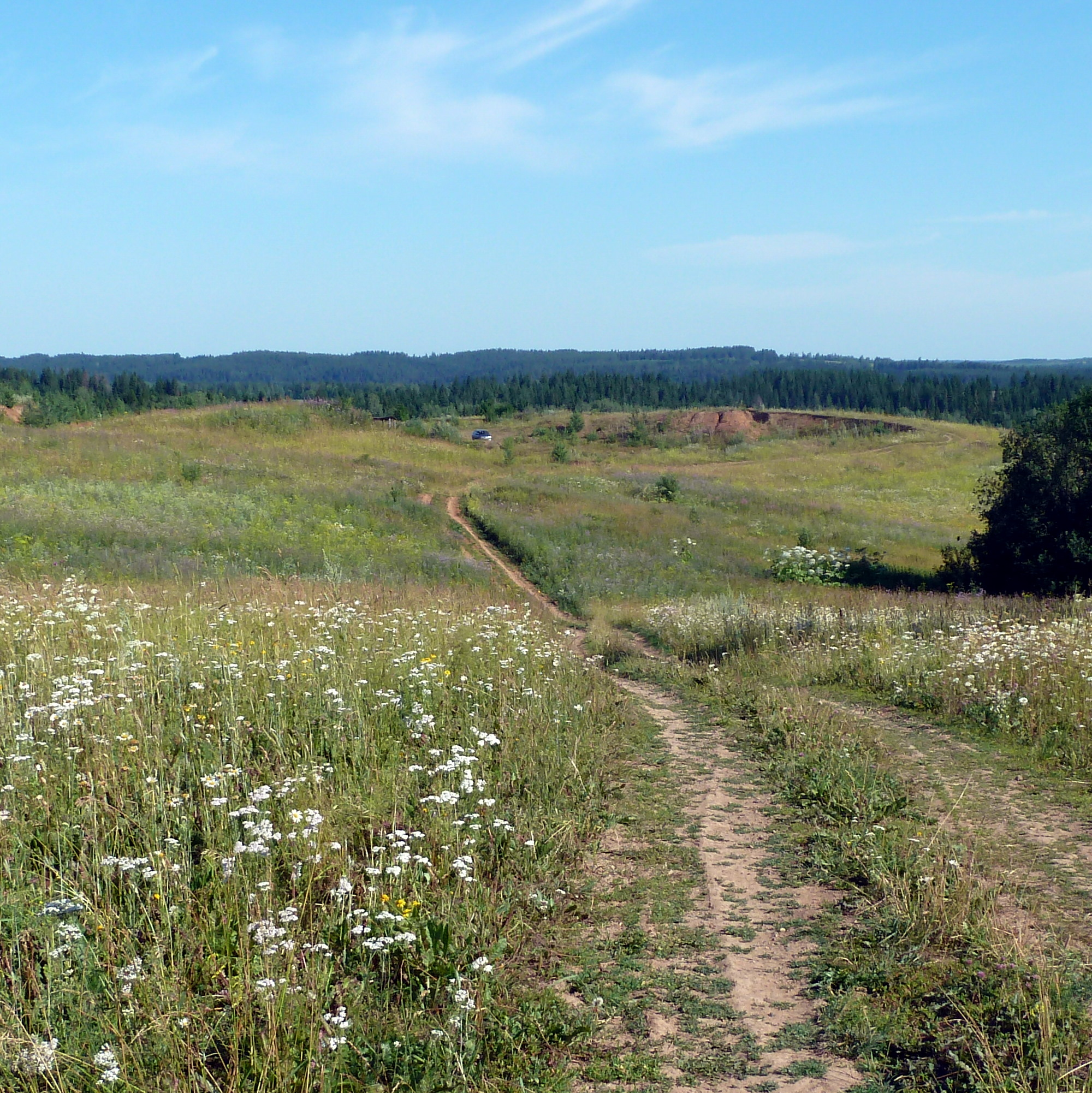 Карьер, Оханский район, Пермский край